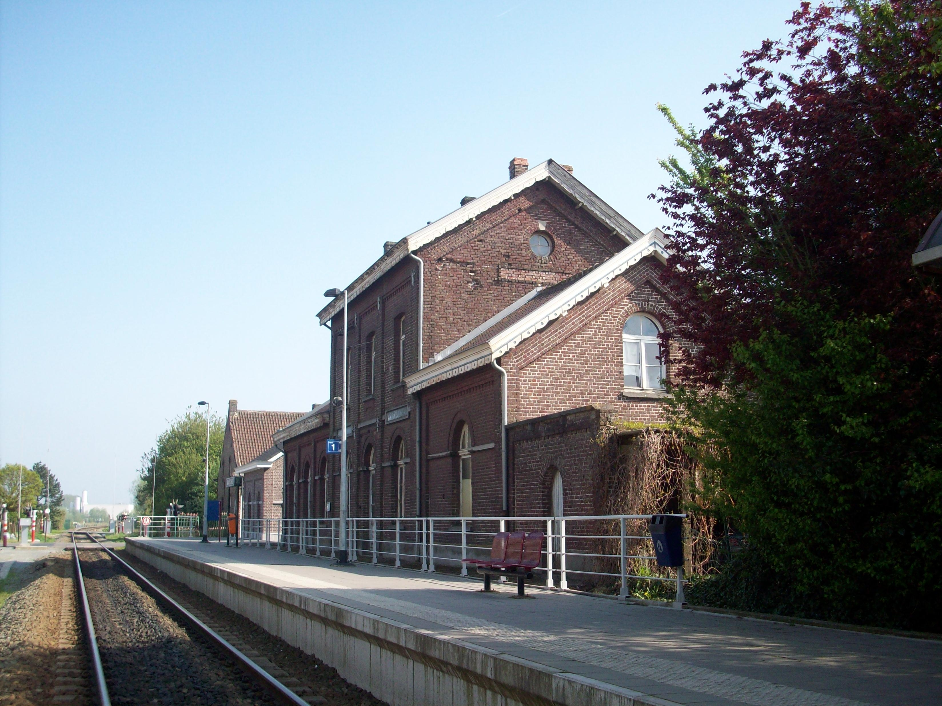 Foto van Station Waarschoot